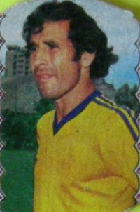 Oscar Palavecino